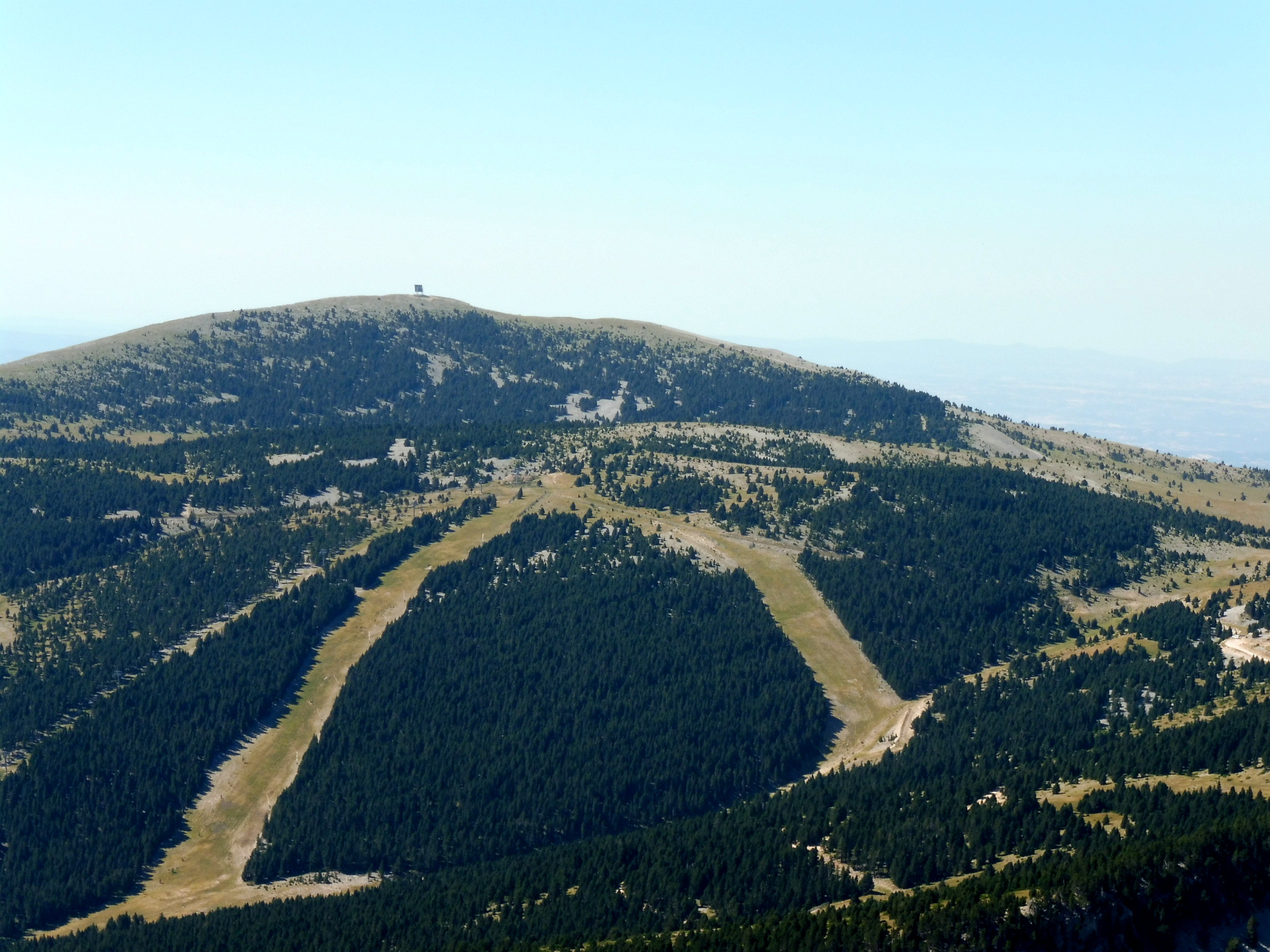 El Serrat de la Bòfia, al centre, amb el Puig de les Morreres a dalt, des de la zona de l'Estivella.